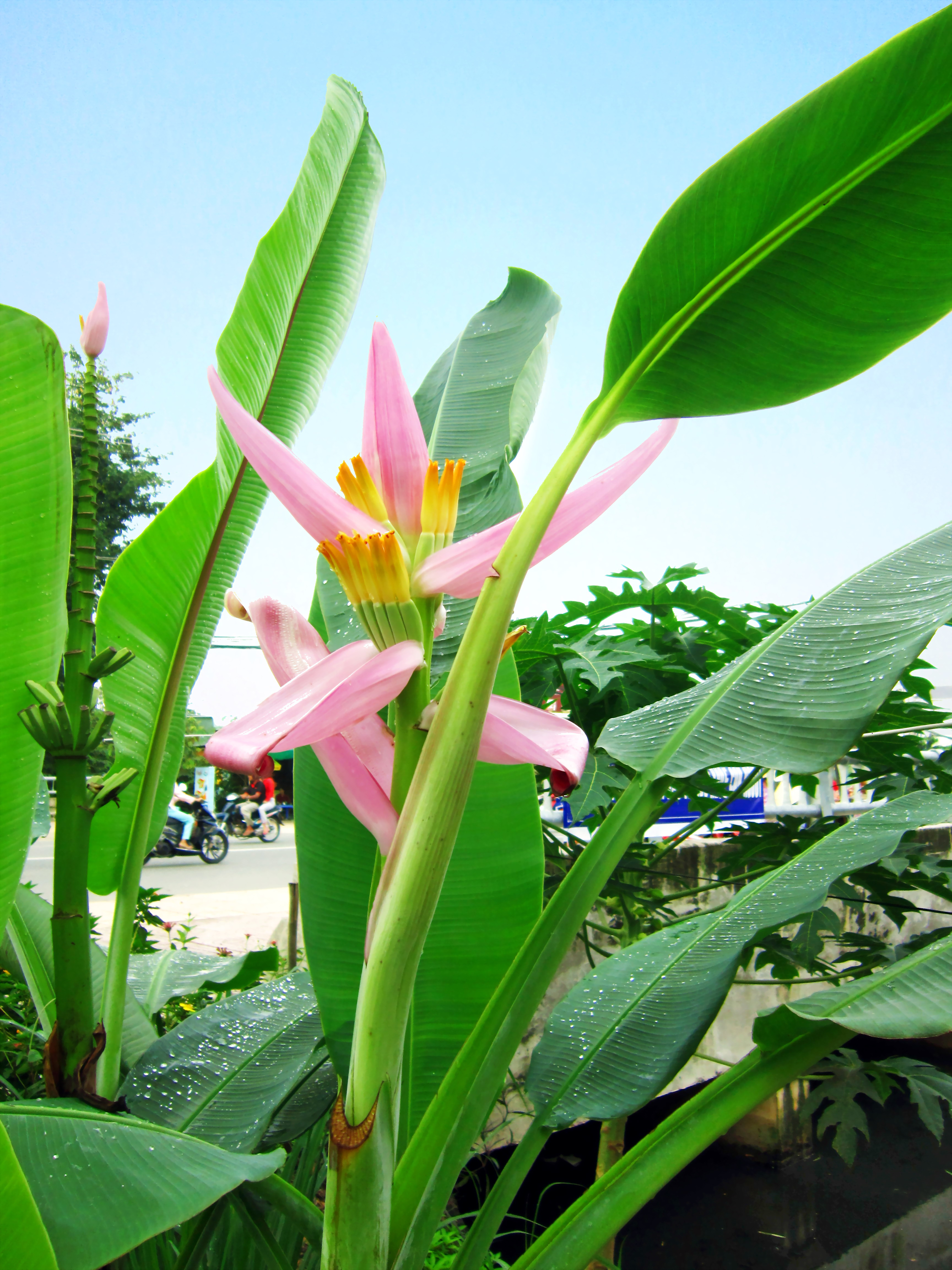 Lá và hoa của chuối hồng (Musa velutina). Ảnh chụp tại Long Xuyên (Việt Nam).